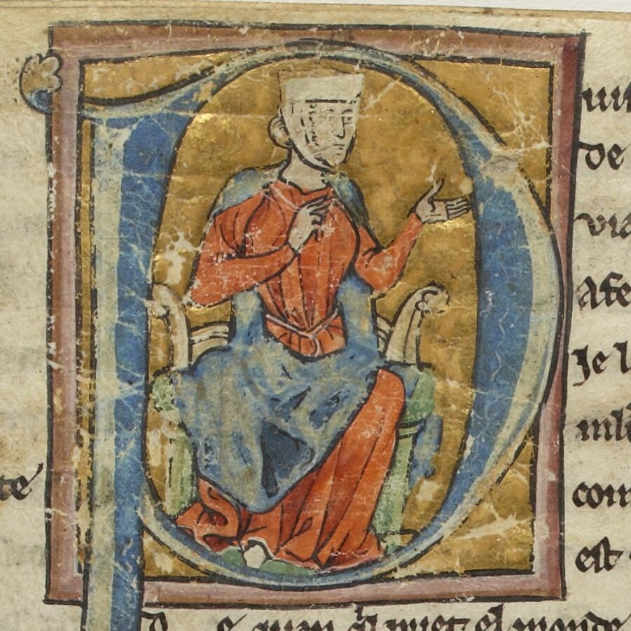 Marie de Champagne